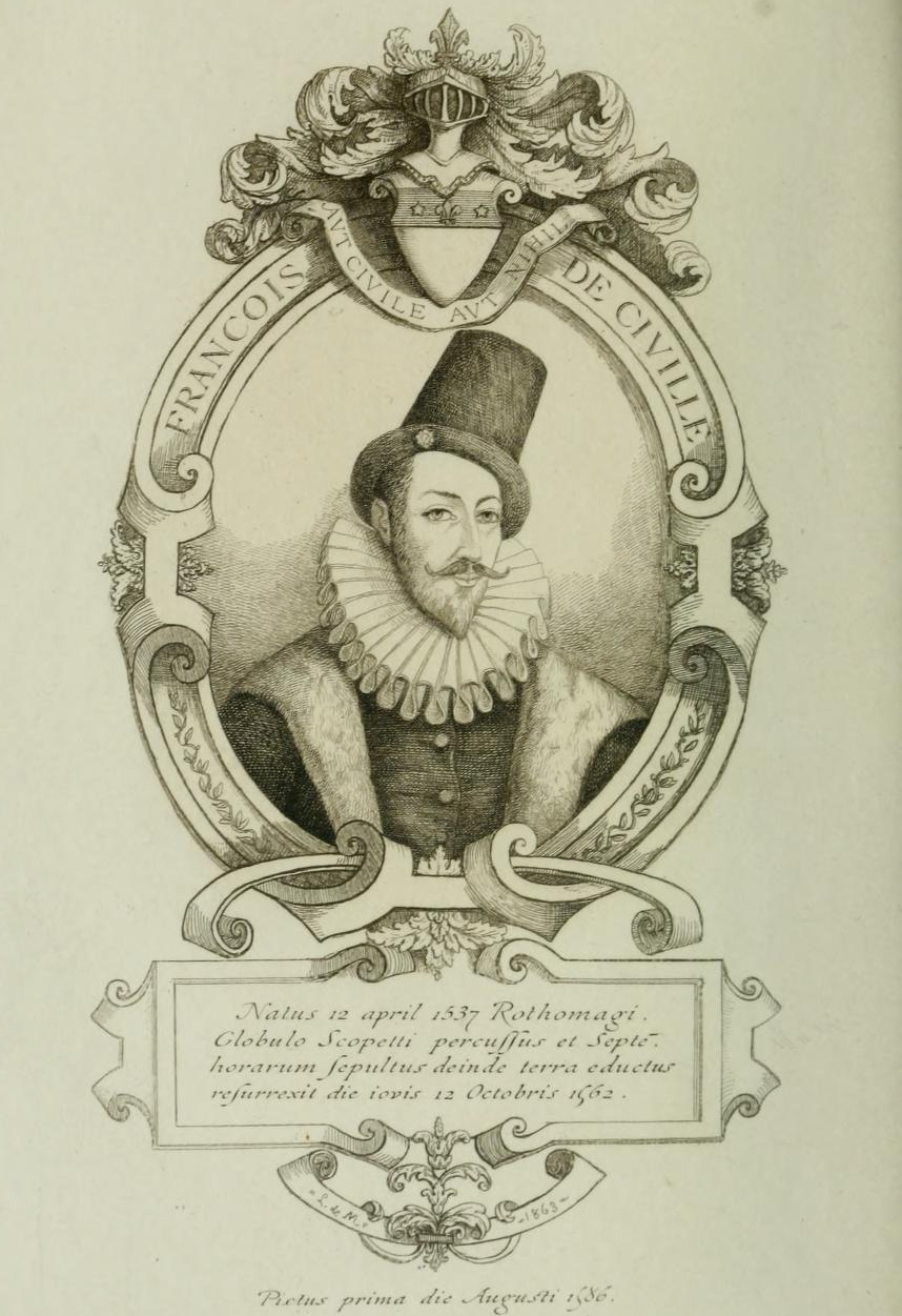 François de Civille